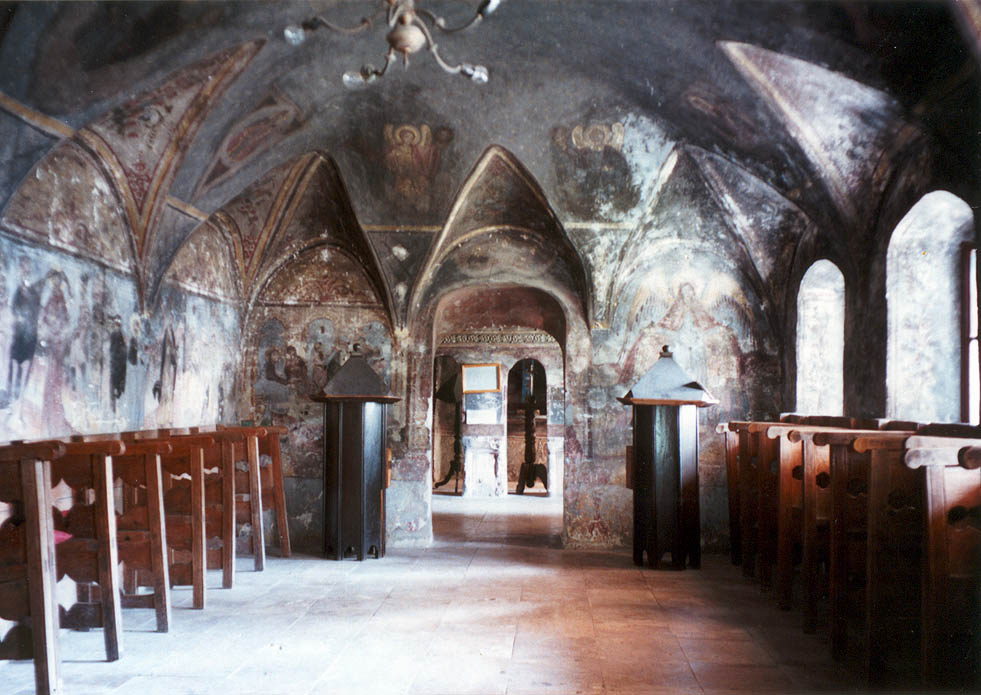 Sinaia Monastery